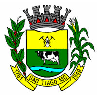 Brasao da Cidade de Sao Tiago, municipio de Minas Gerais, Brasil